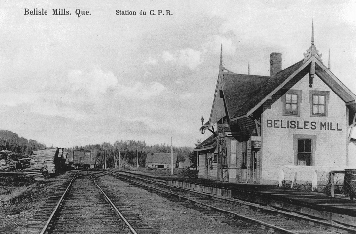 Belisles Mill, Québec